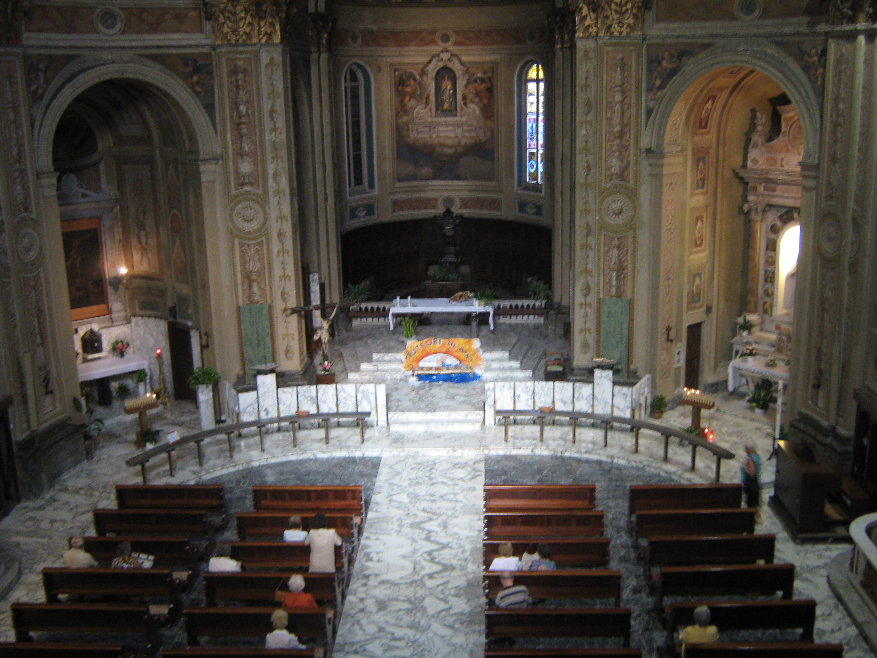 Interno della Chiesa di Santa Maria Maggiore di Cogoleto